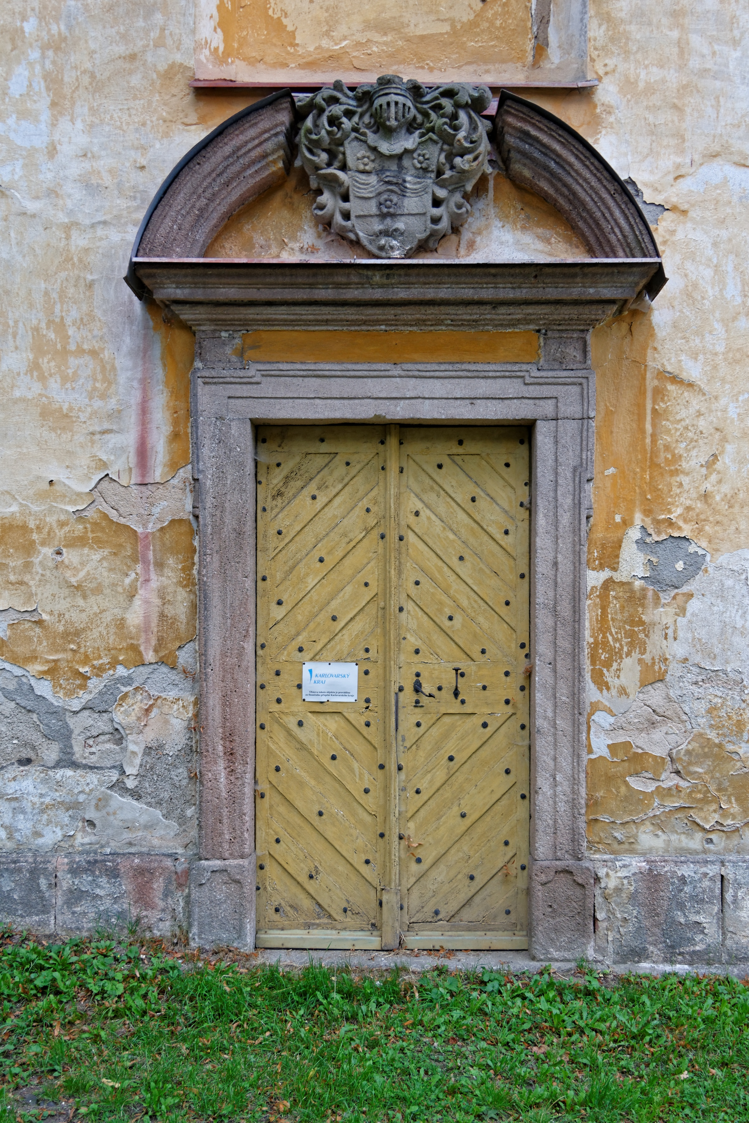 Kostel svatého Vavřince, Luka (Verušičky).